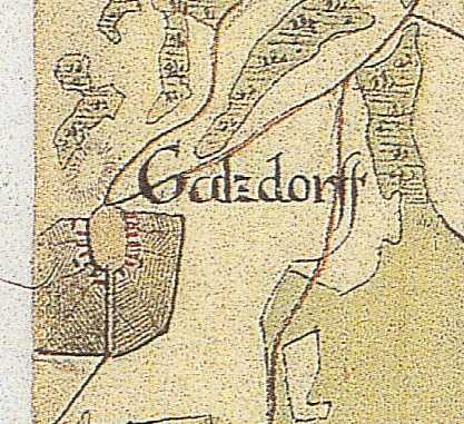 Karte von Gadsdorf (Ortsteil der Gem. Am Mellensee, Brandenburg, Deutschland), aus den Jahren 1767 bis 1787, Land Brandenburg, Deutschland